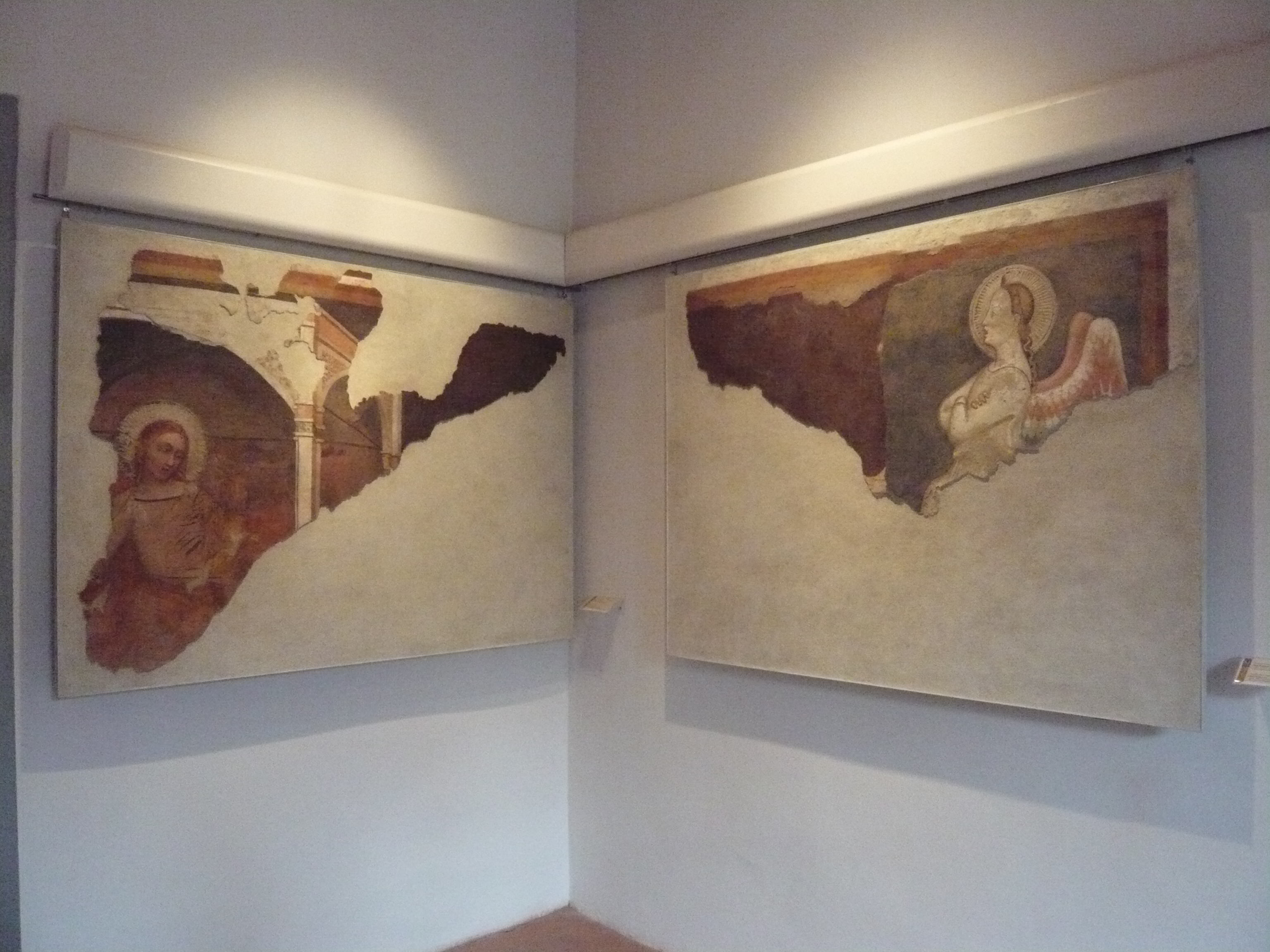 Pace di Bartolo, Annonciation, Palazzo Vallemani, Assise